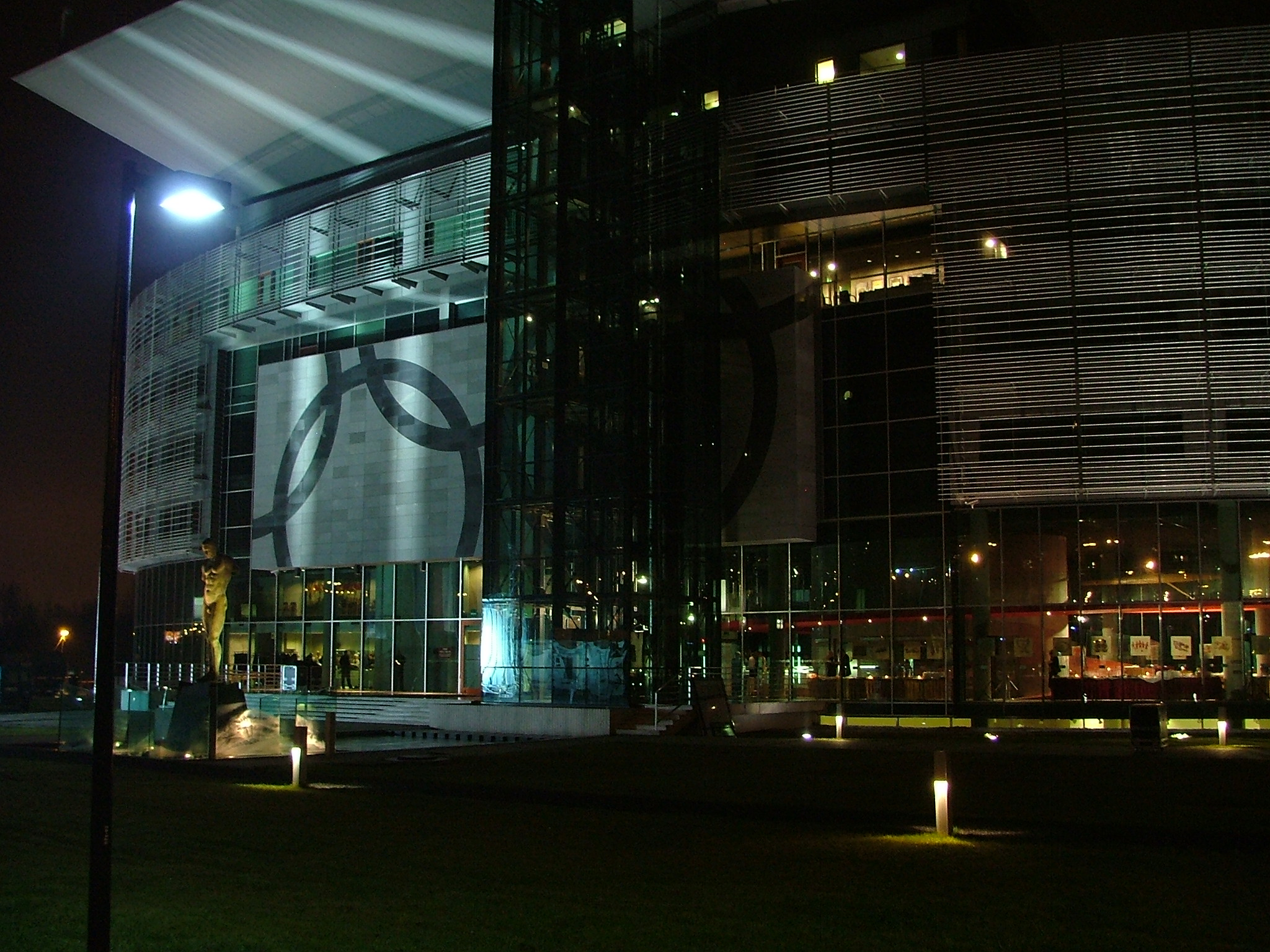 Impreza z okazji 1. urodzin TVP Sport, Warszawa, Centrum Olimpijskie